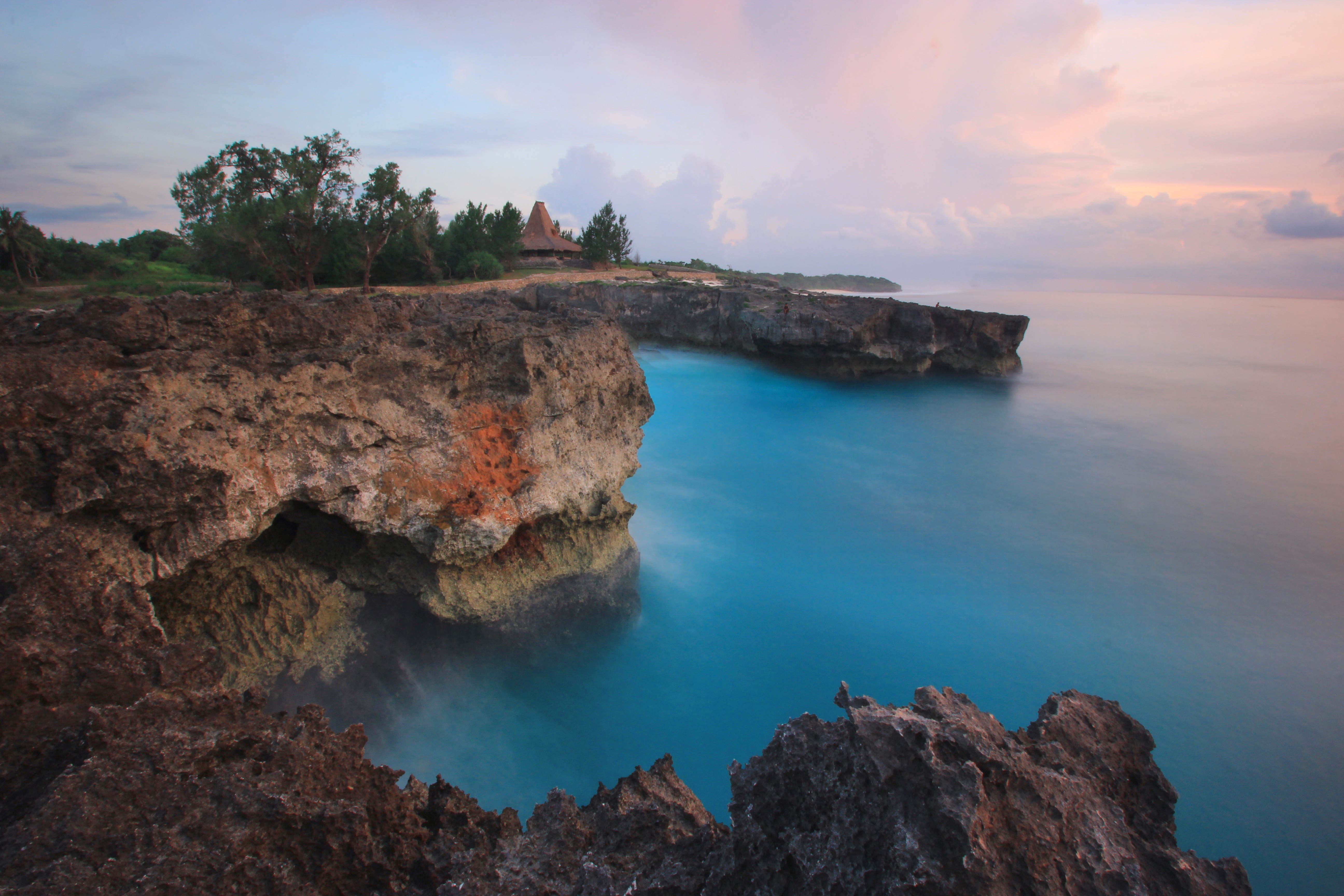 Pantai Mandorak adalah pantai yang terletak di Kec. Kodi, Sumba Barat Daya, Nusa Tenggara Timur, Indonesia. Pantai ini memiliki ciri khas dengan tebing-tebing karang yang mengelilinginya.